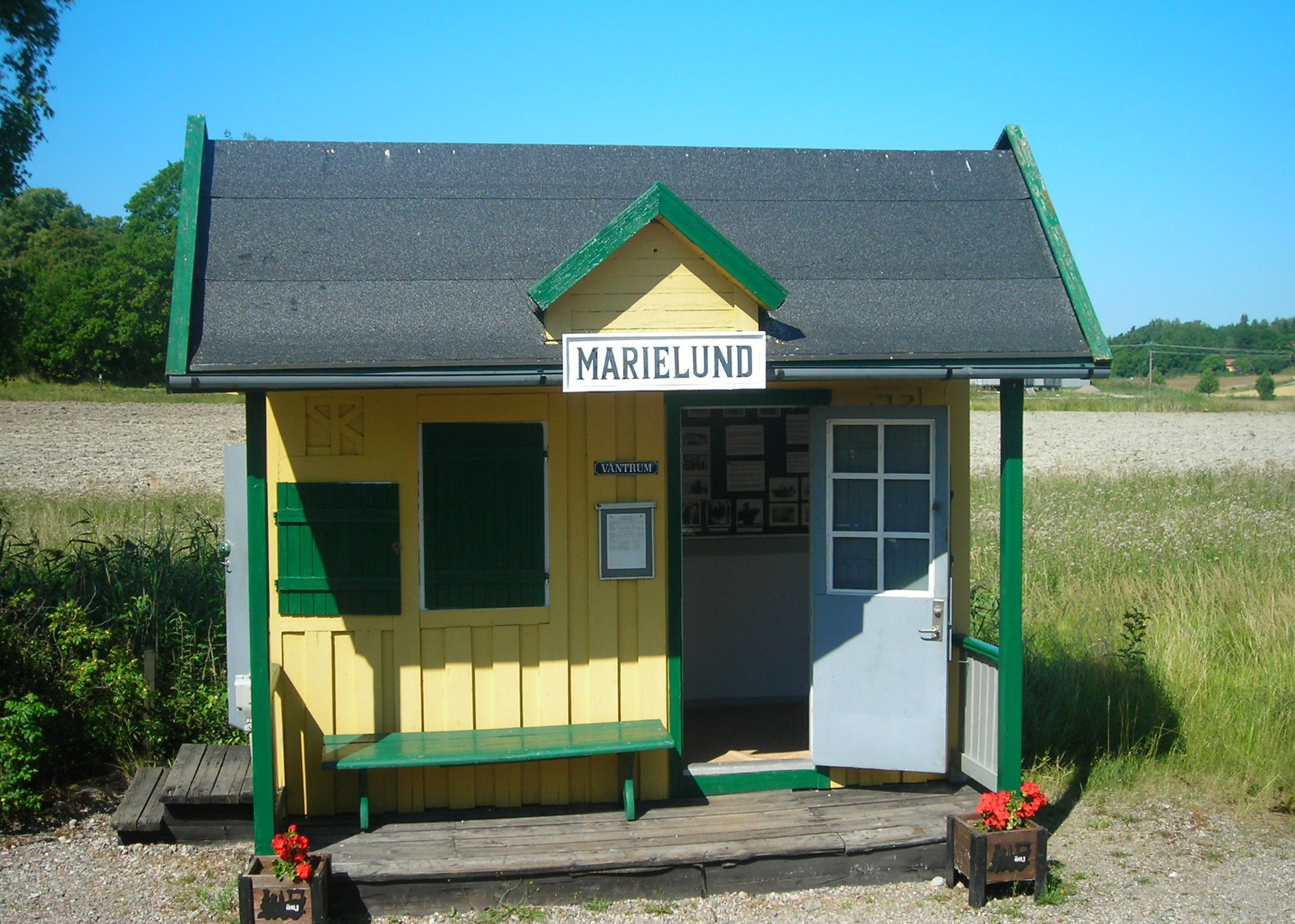 Marielund